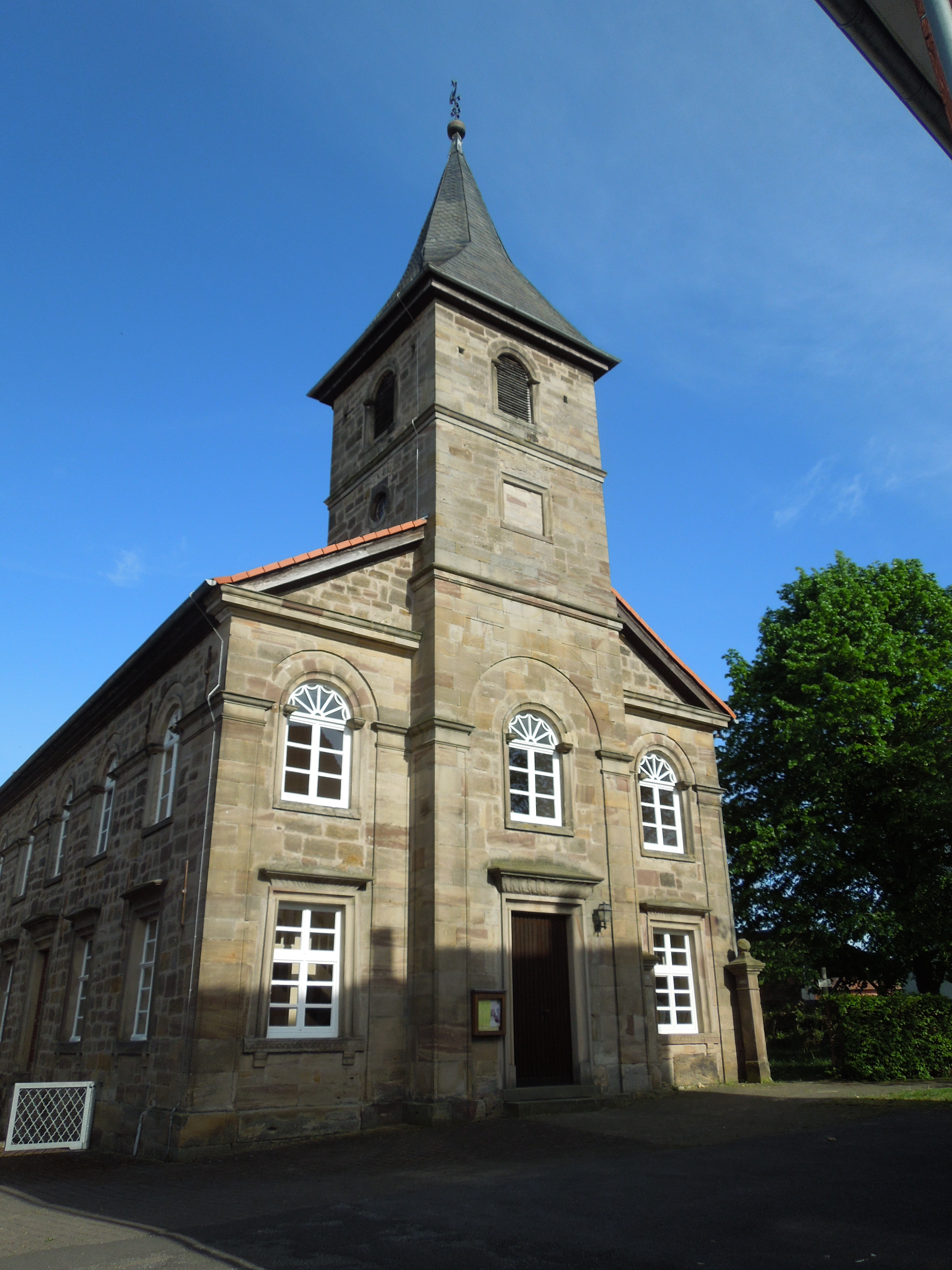 Dorfkirche im Fritzlarer Stadtteil Haddamar